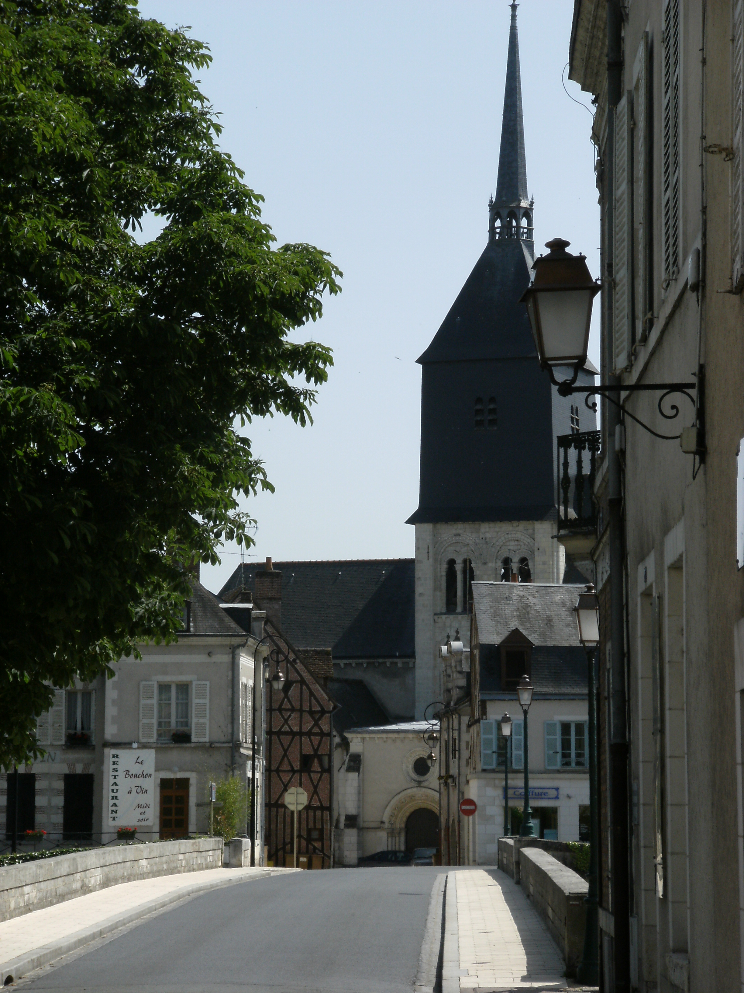 Pont de Romorantin entre le centre-ville et le Bourgeau ; au fond l'église Saint-Étienne (Romorantin-Lanthenay, Loir-et-Cher, France)